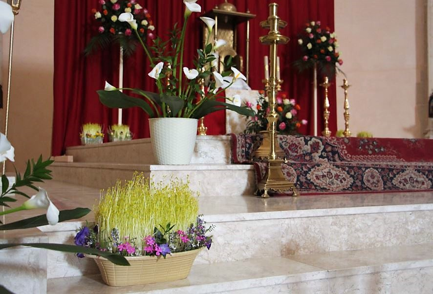 Triguicos de la Semana Santa de Ayora. Planta hecha a base de germinados de trigo que se colocan junto al sagrario el Jueves Santo.